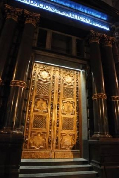 Fachada de Fundación Estudios Litoral Argentino en Palacio Fuentes